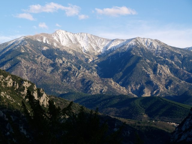 Grand Site du Massif de Canigó, ©Réseau des Grands Sites de France